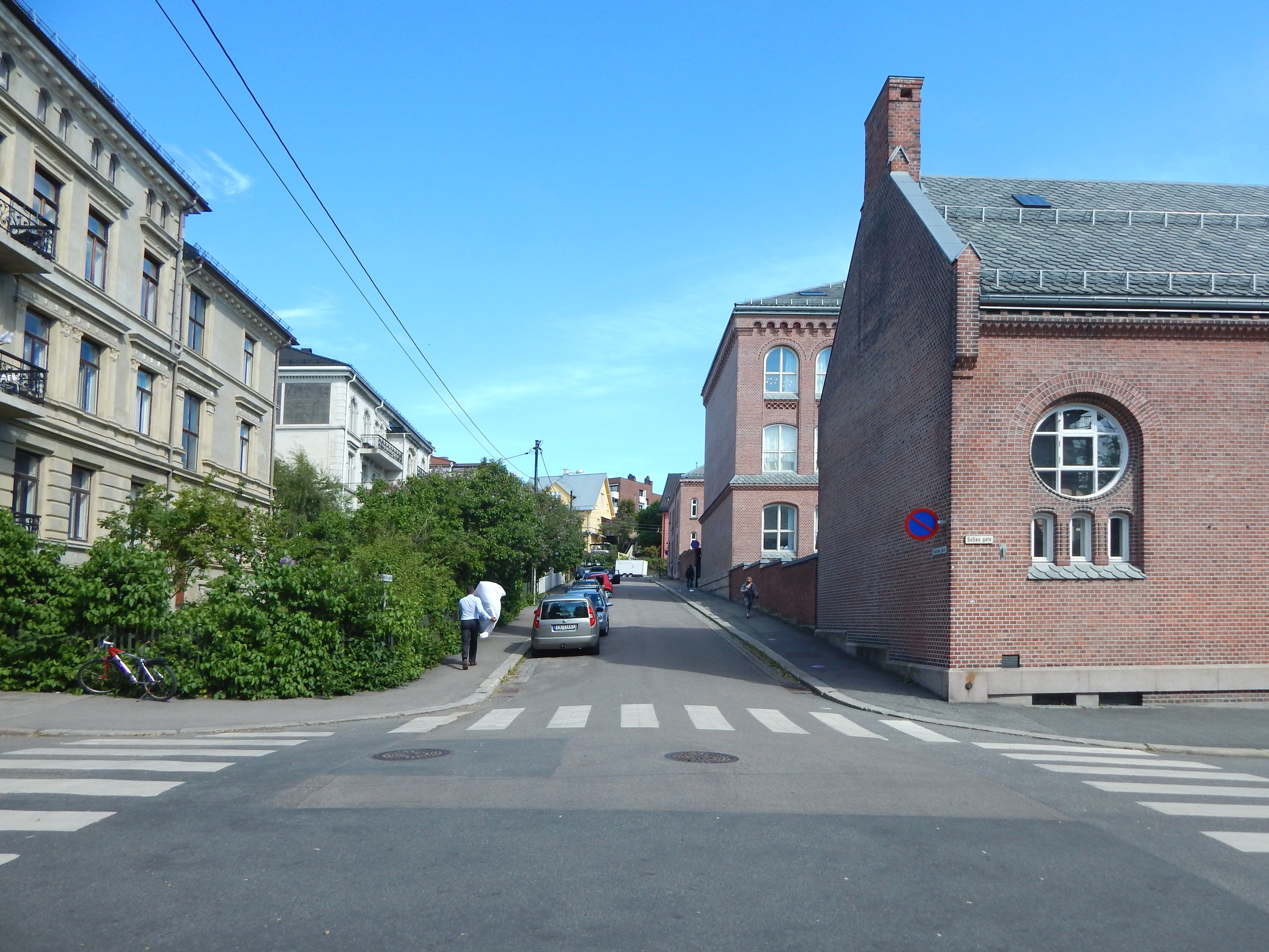 Snorres gate sett fra Sofies gate